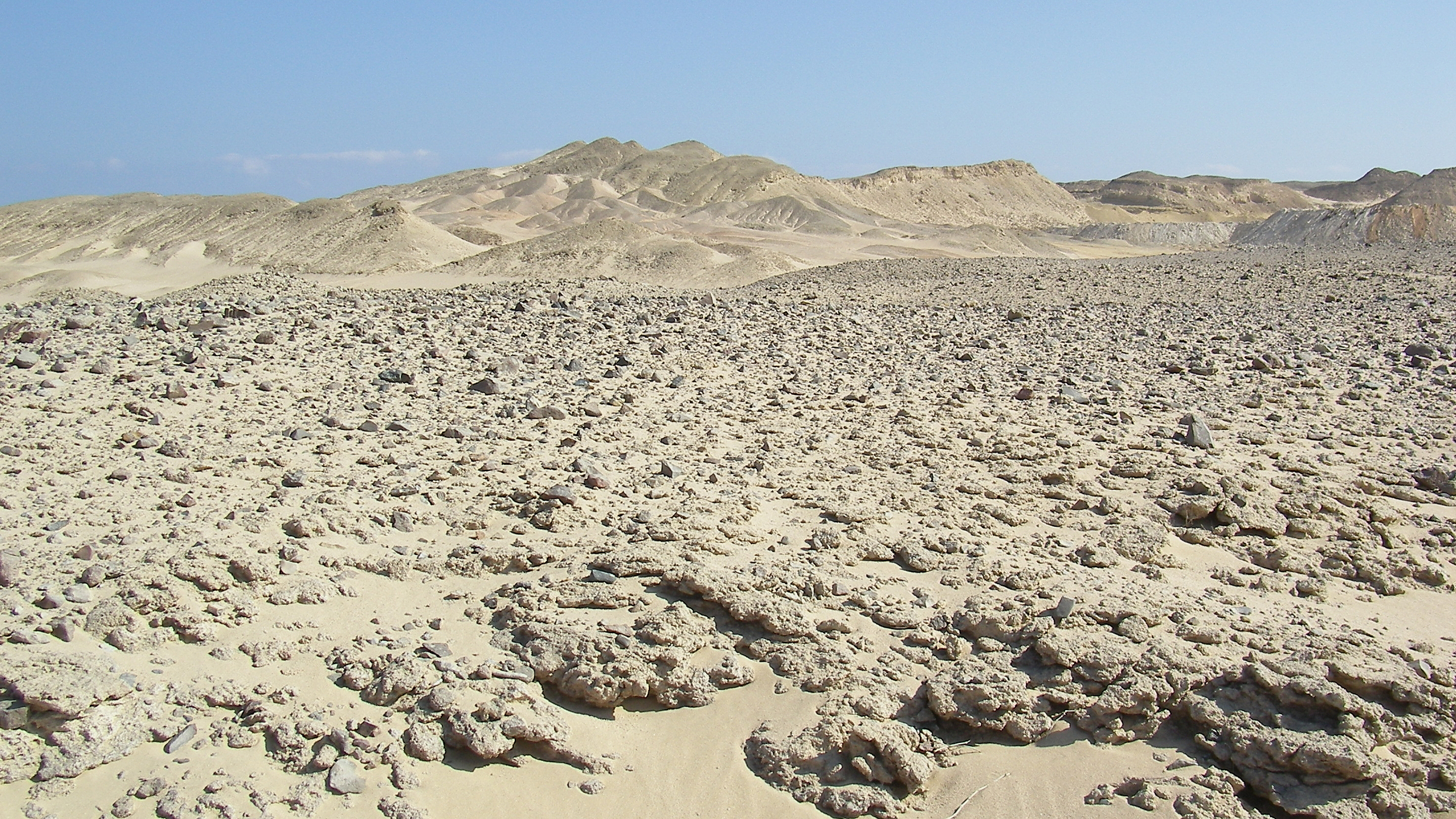 Desert in Hurghada, Egypt